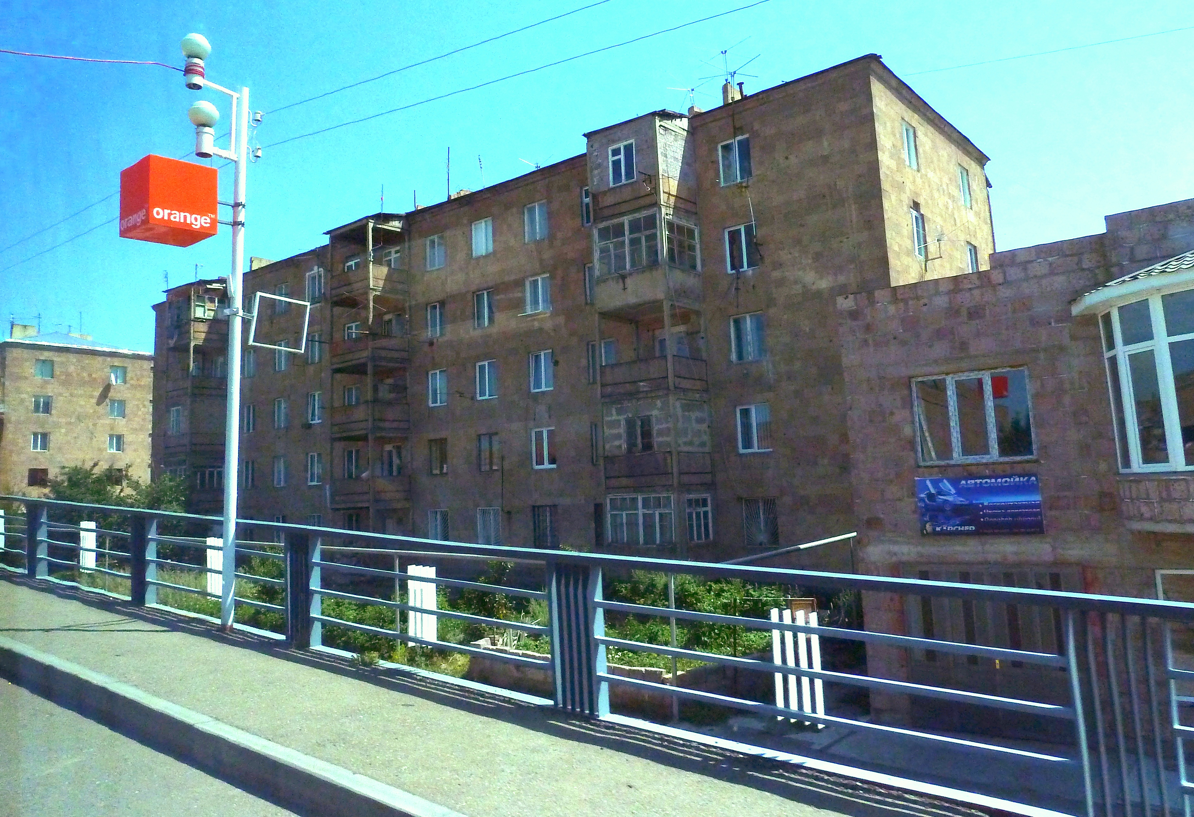 Город Артик